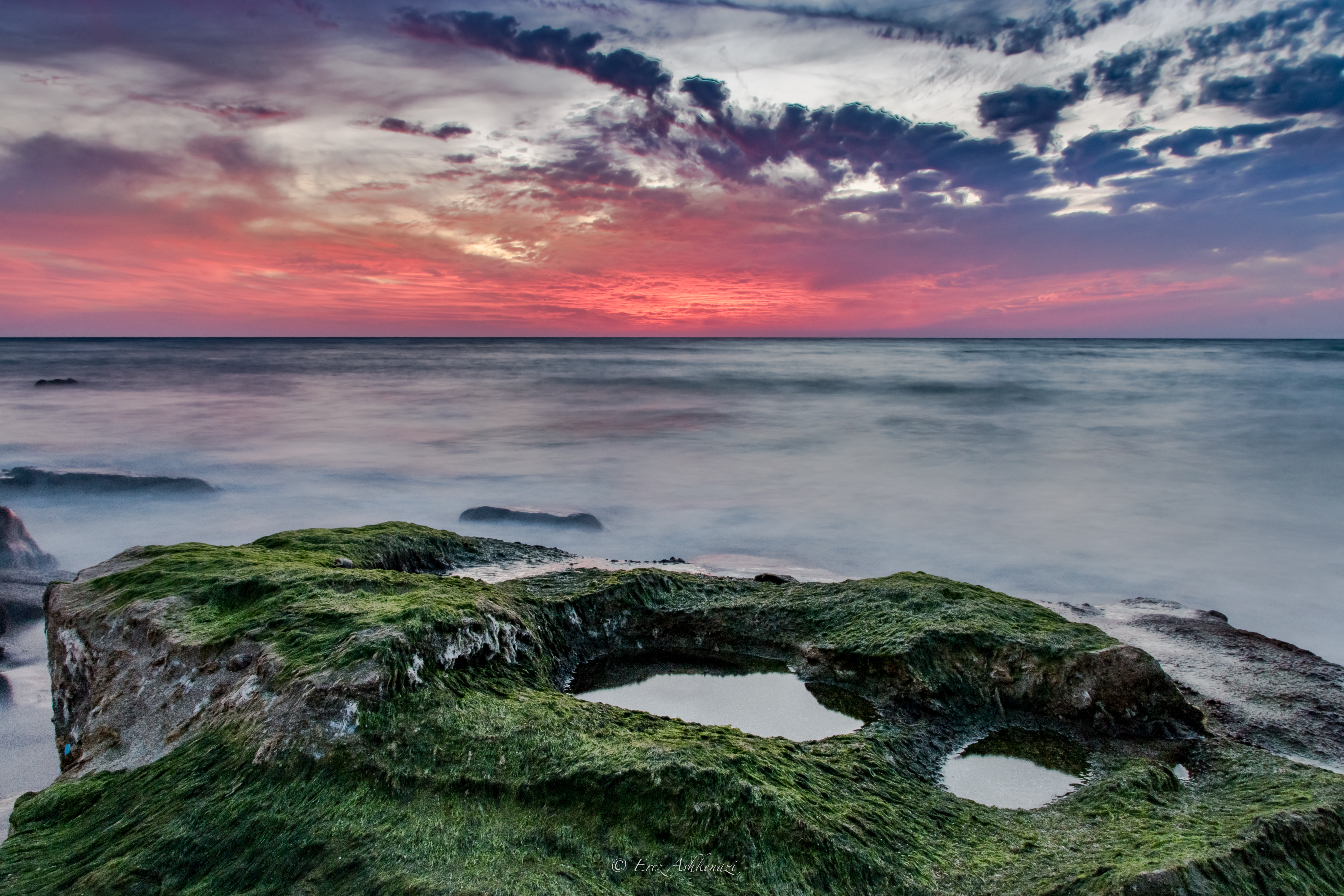 אַכְזִיב היה יישוב קדום לחופי הים התיכון בגליל המערבי, כ-5 קילומטר צפונית לנהריה. באכזיב גן לאומי, שתי שמורות טבע (שמורת חוף אכזיב ושמורה ימית), בית ספר שדה ושרידים של הכפר הערבי א-זיב.